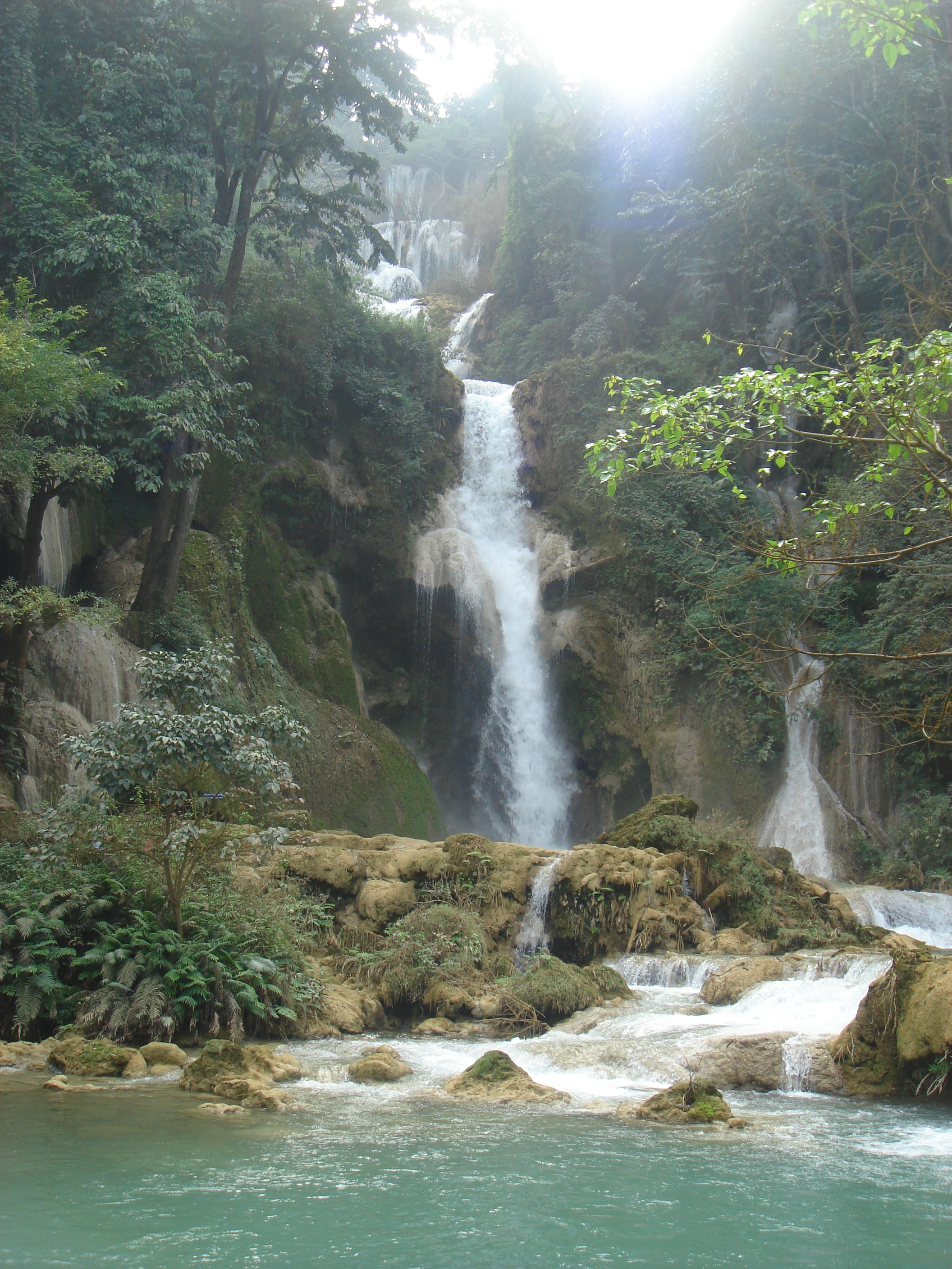 Kuang Si Falls, Laos